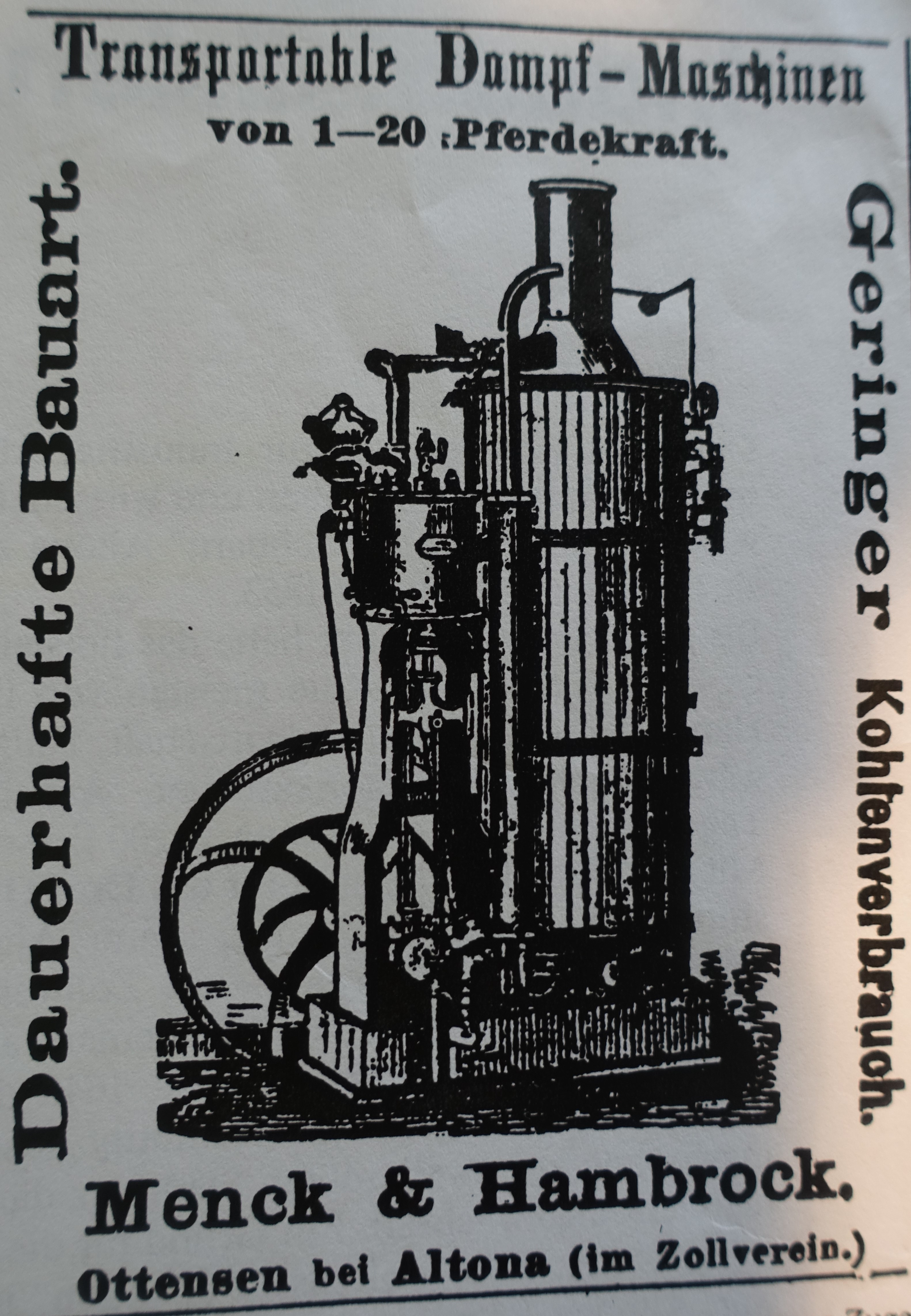 Dampfmaschine von Menck & Hambrock 1869 mit Hinweis auf Zollverein